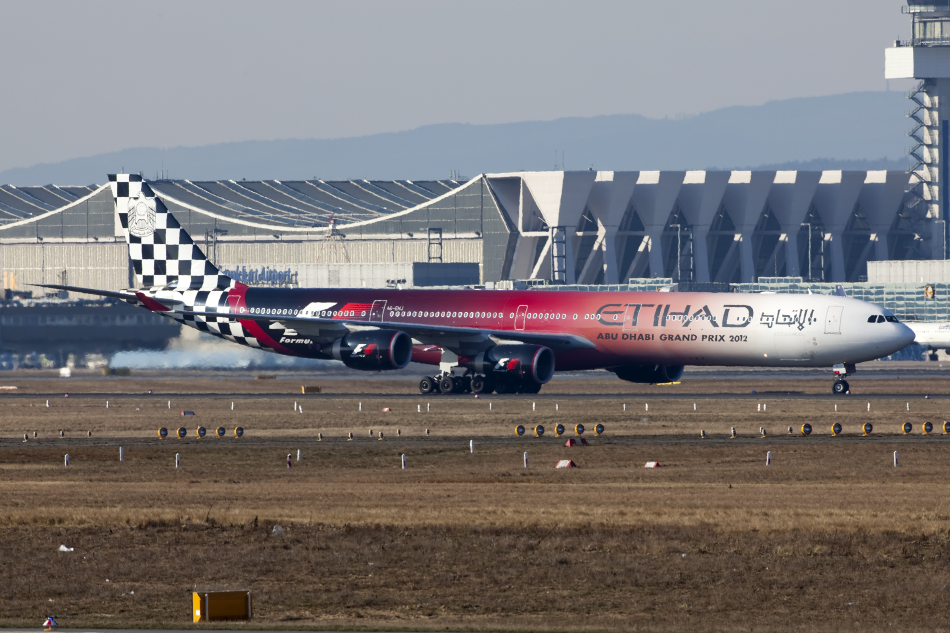 Frankfurt